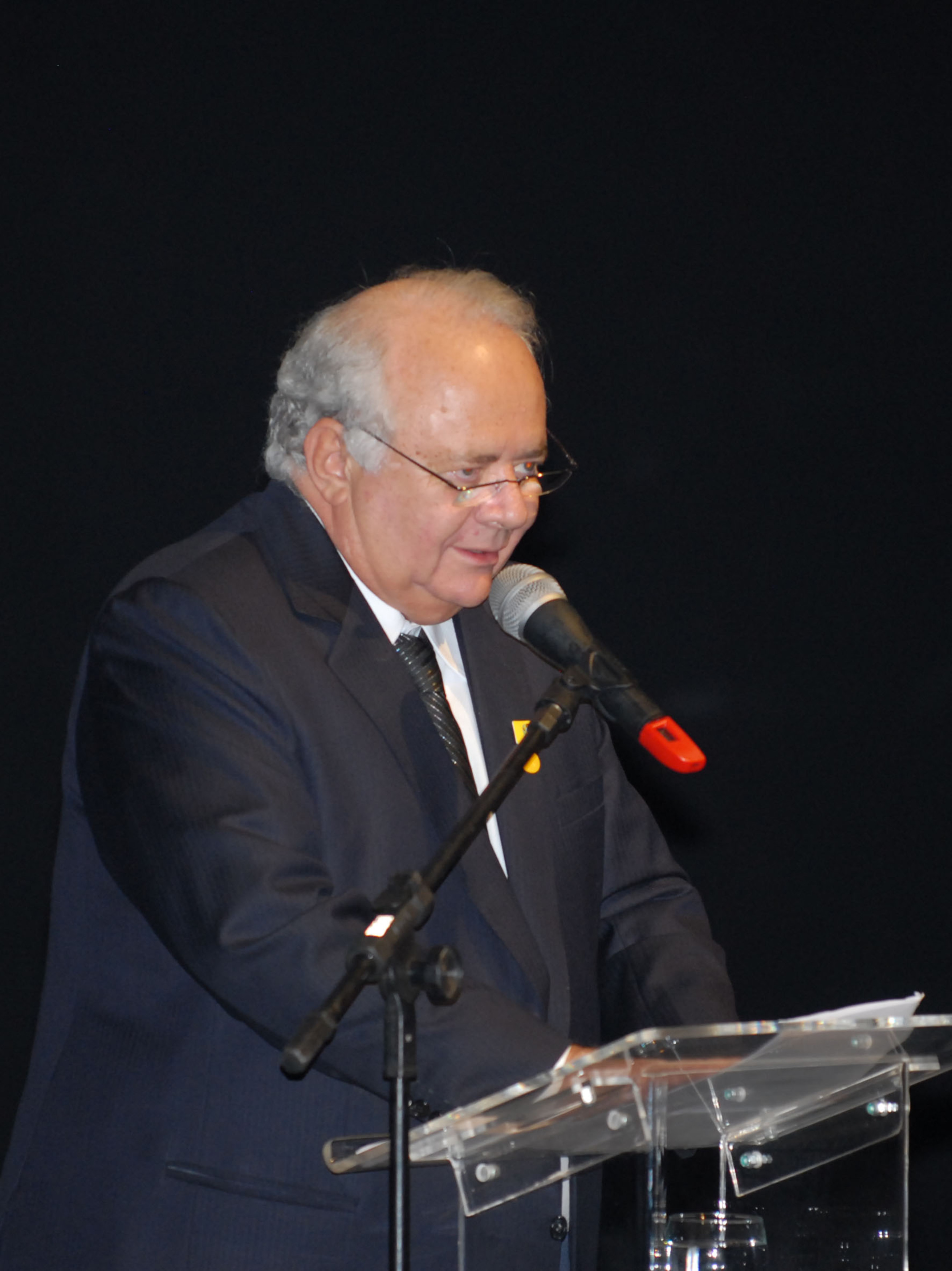 O presidente dos Diários Associados, Álvaro Teixeira, fala durante jantar comemorativo dos 50 anos do jornal Correio Braziliense.